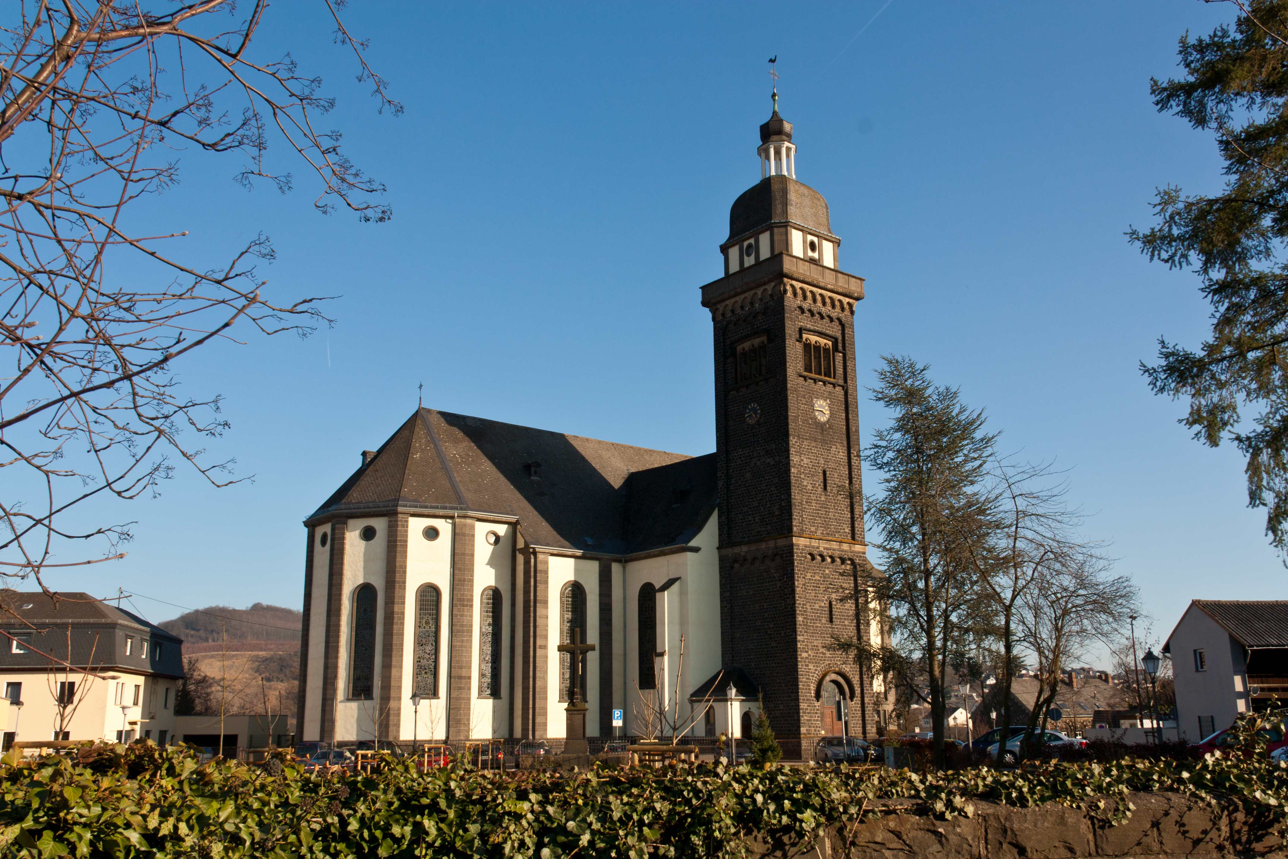 Blick auf St. Dionysius von der B256